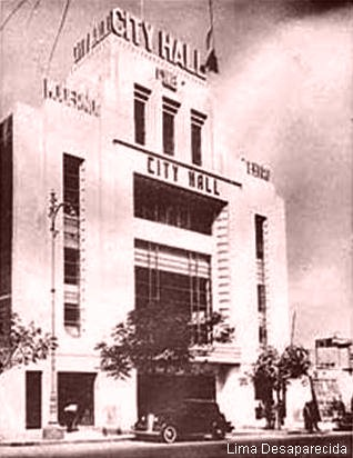 Fuente: Lima desaparecida